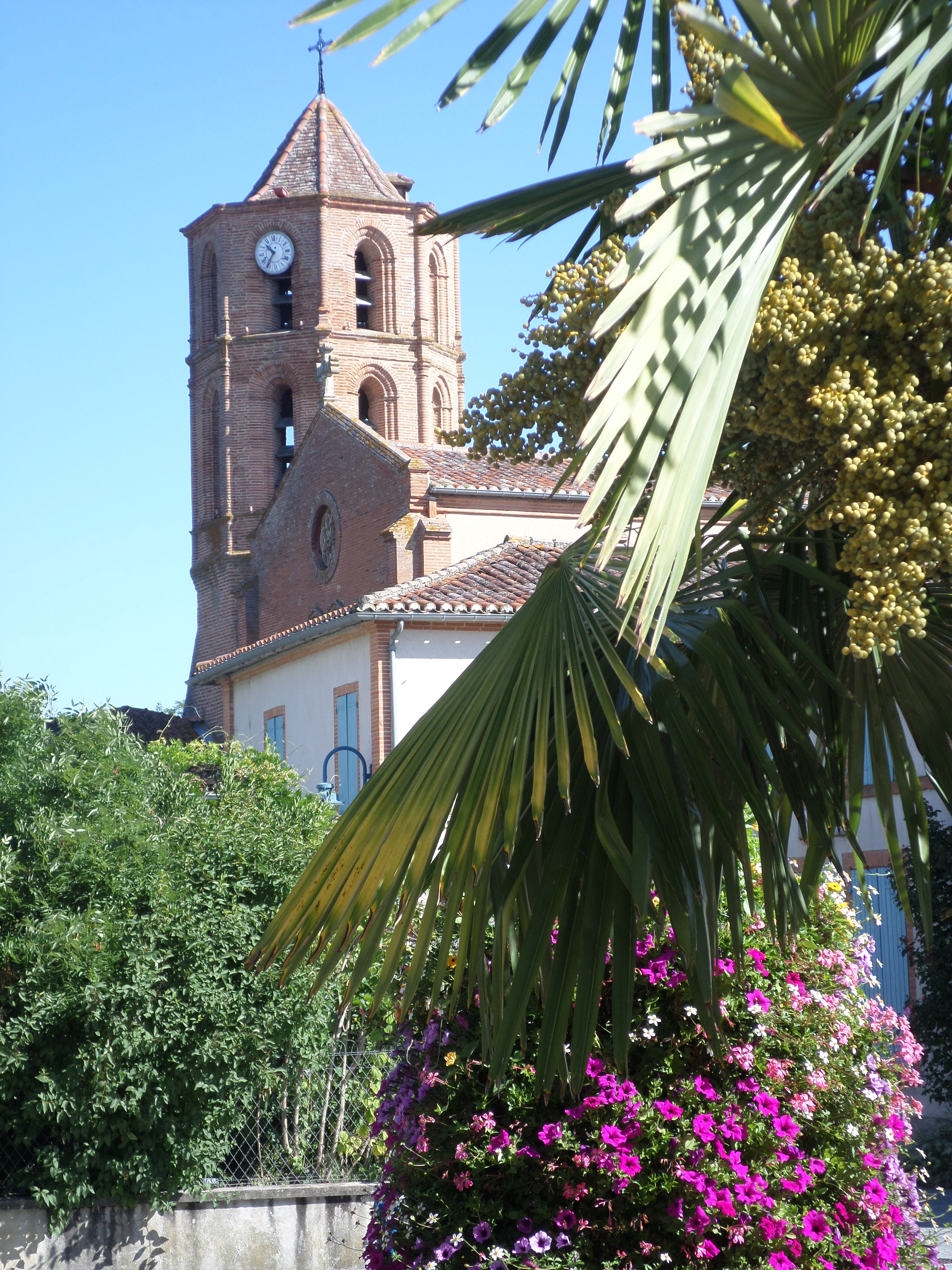 L’Eglise, construite au XIIIe siècle, fut dédiée aux saints martyrs Fabien et Sébastien et devint chef-lieu d’un prieuré dont les revenus appartenaient au chapitre cathédral de Montauban. En savoir +